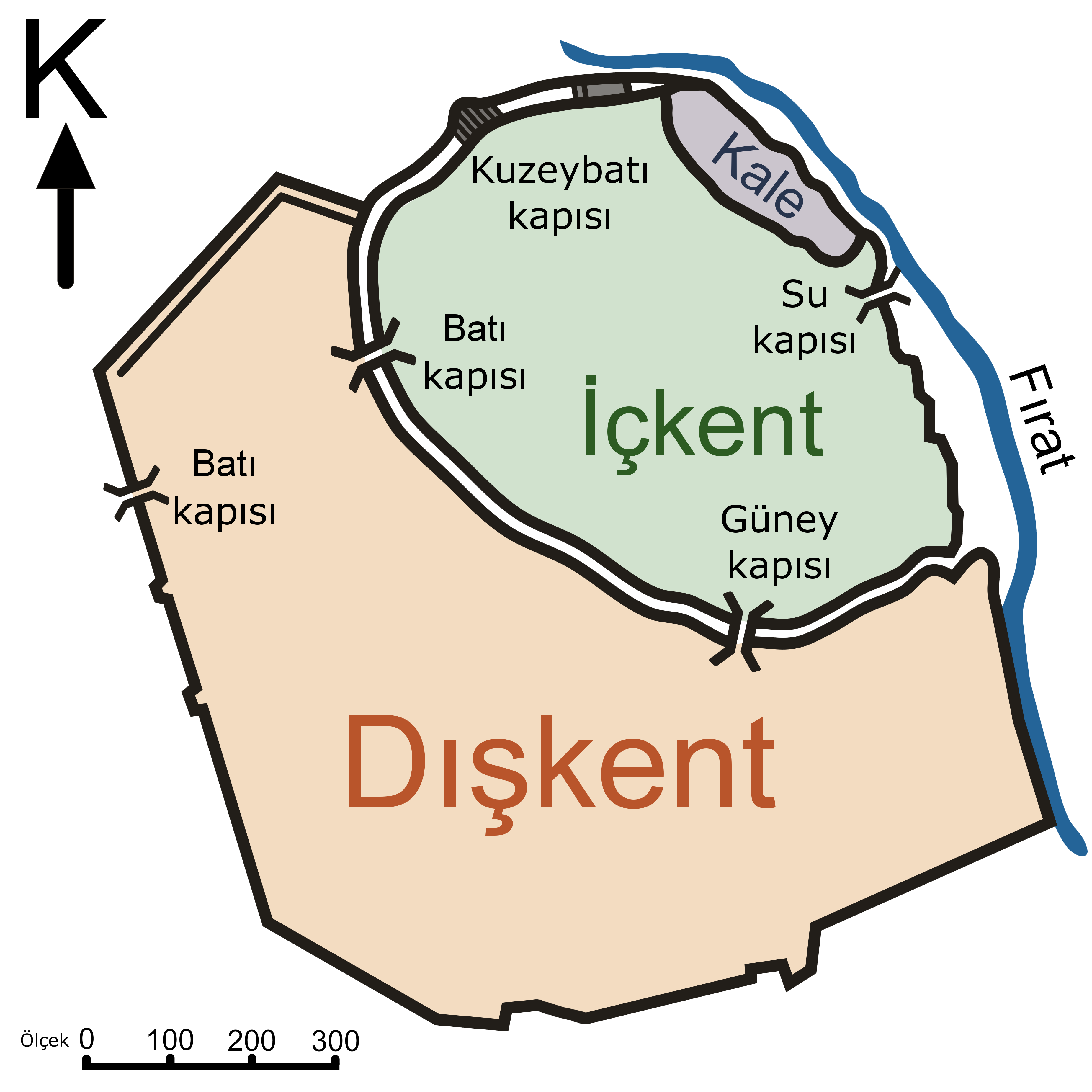 Antik Karkamış kentinin şehir planı.